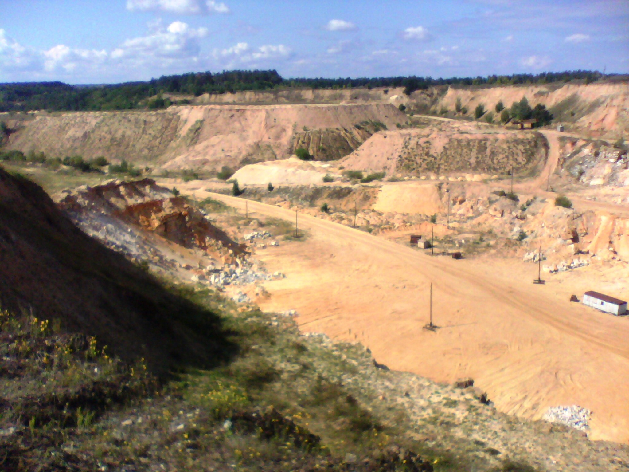 Баницький кар'єр кварцитів